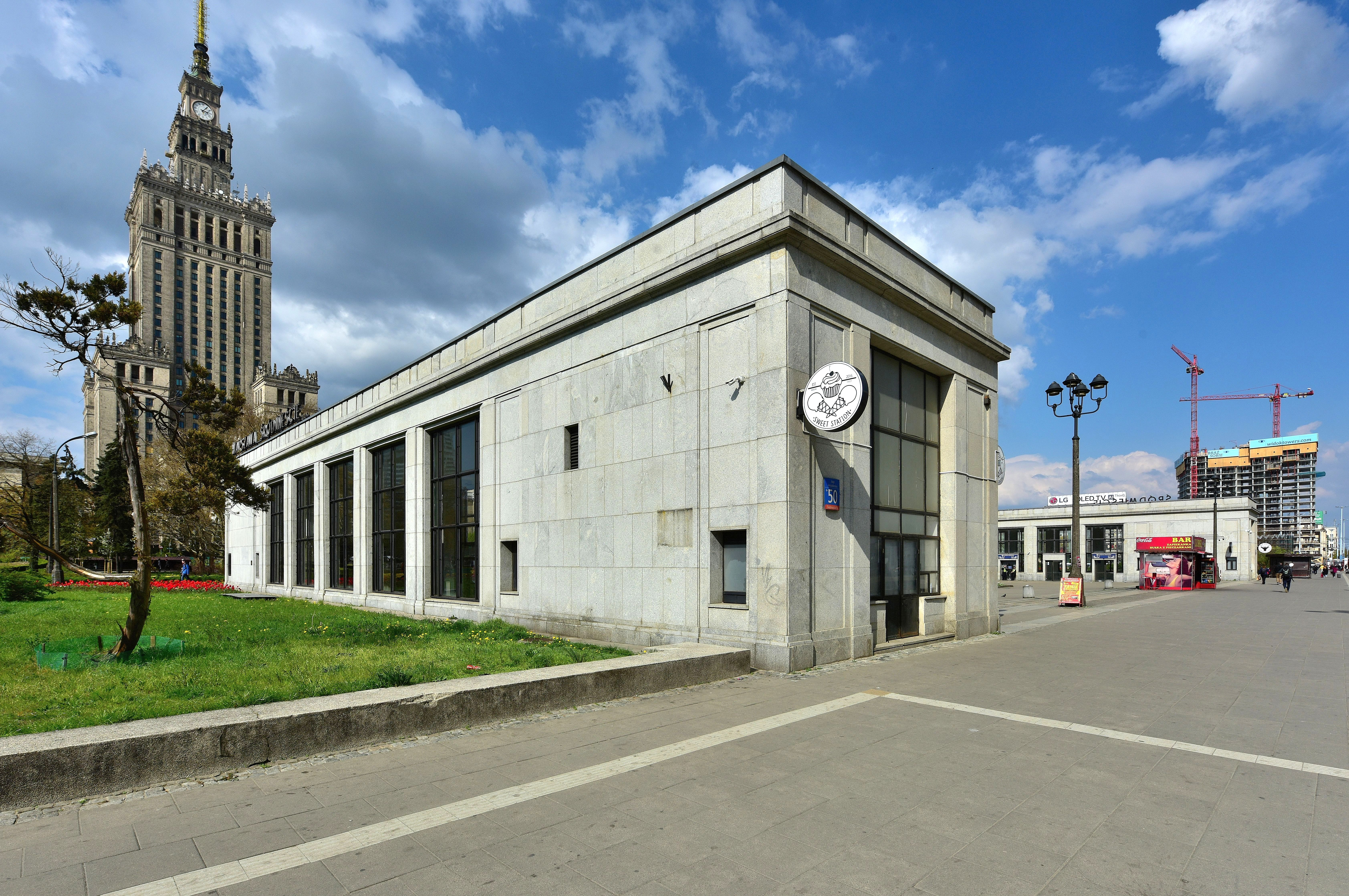 Dworzec Warszawa Śródmieście od strony Alej Jerozolimskich